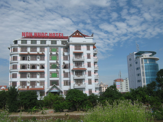 Phong cảnh đô thị thành phố Ninh Bình